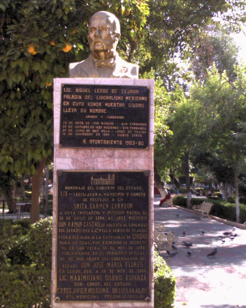 Busto del Lic. Miguel Lerdo de Tejada, en la plaza de Armas de Cd. Lerdo, Durango. Fotografía tomada el 9 de Abril de 2006. Photographer: Salvador De los Reyes Delosrjs )